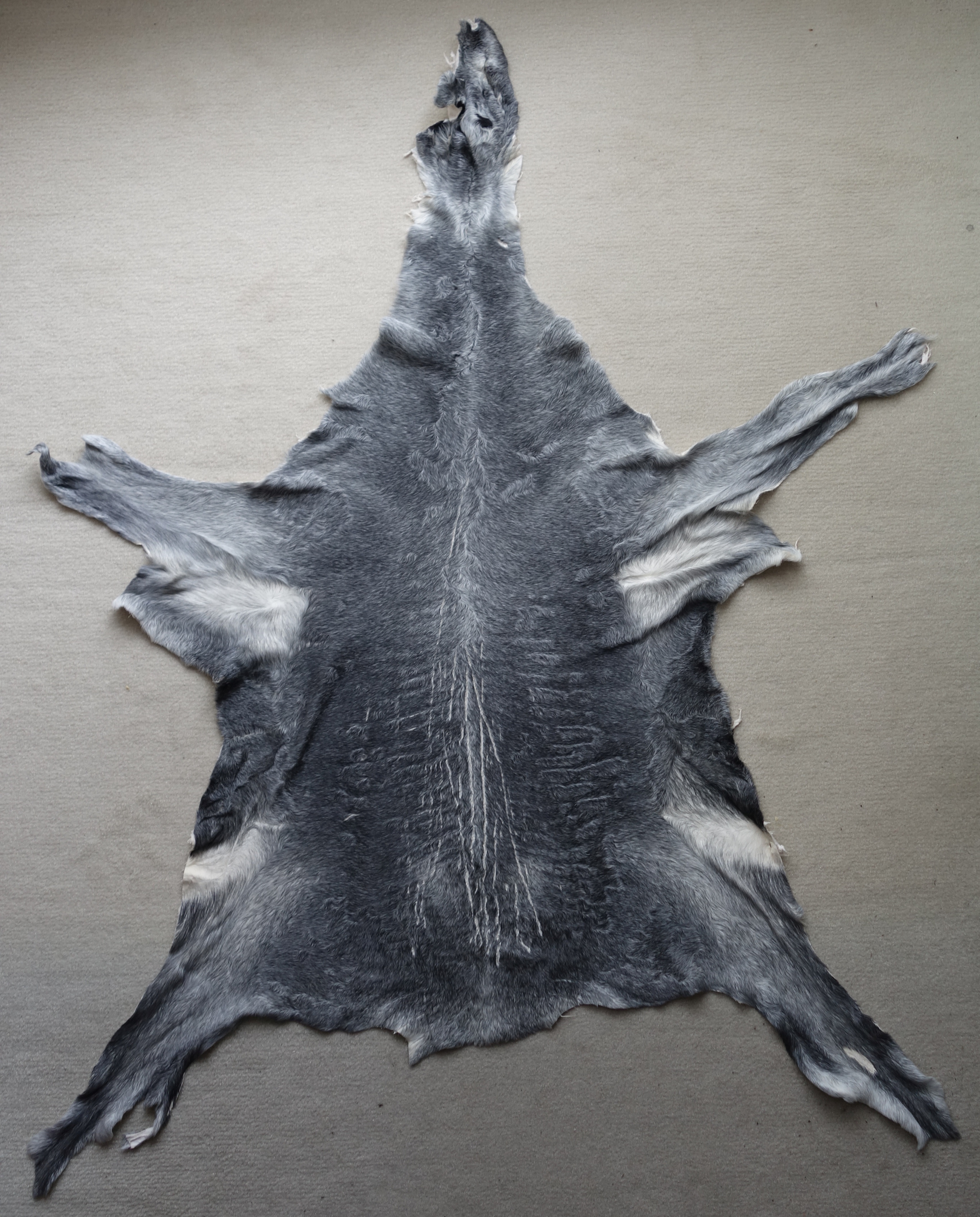 Schnatten in einem naturfarbenen Afghanischem Makmali-Persianerfell (Makmali: eine Sorte, fast ohne Zeichnung). Gesehen bei Mayer & Cie., Frankfurt am Main.